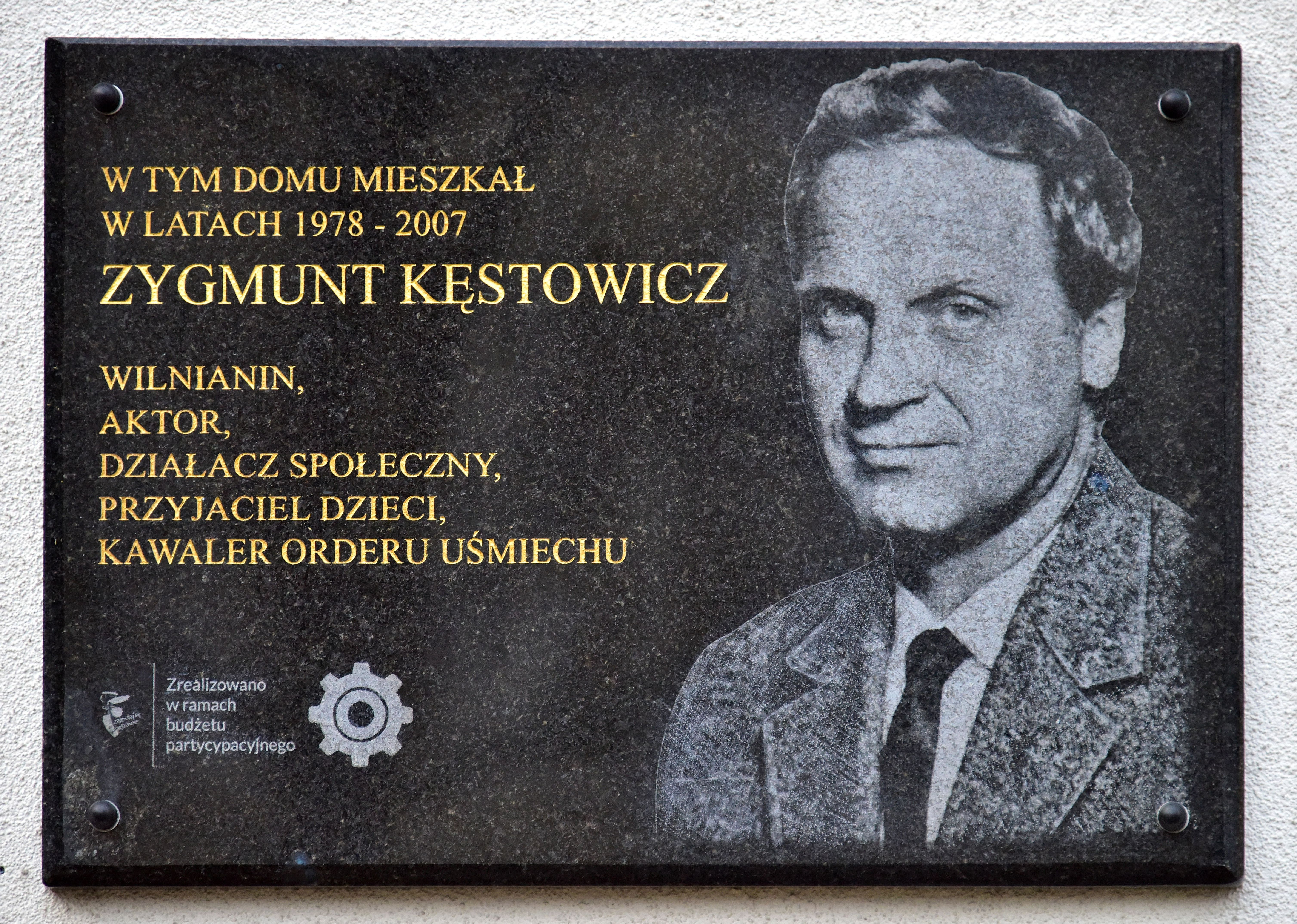 Tablica upamiętniająca Zygmunta Kęstowicza przy ul. Komorskiej 8 w Warszawie.